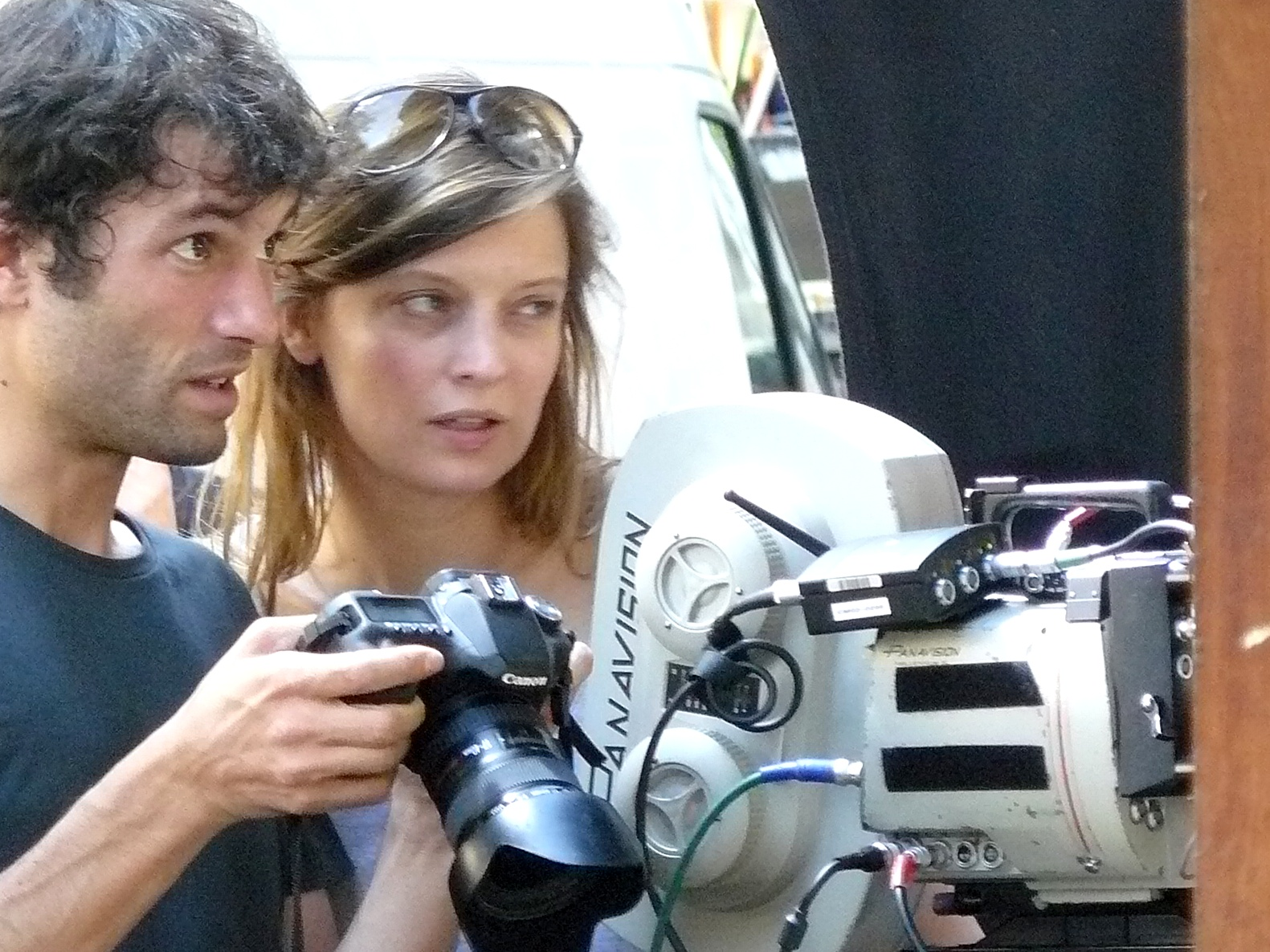 La réalisatrice Jennifer Devoldère, lors du tournage de "Et soudain, tout le monde me manque" à Paris, le 30 juillet 2010